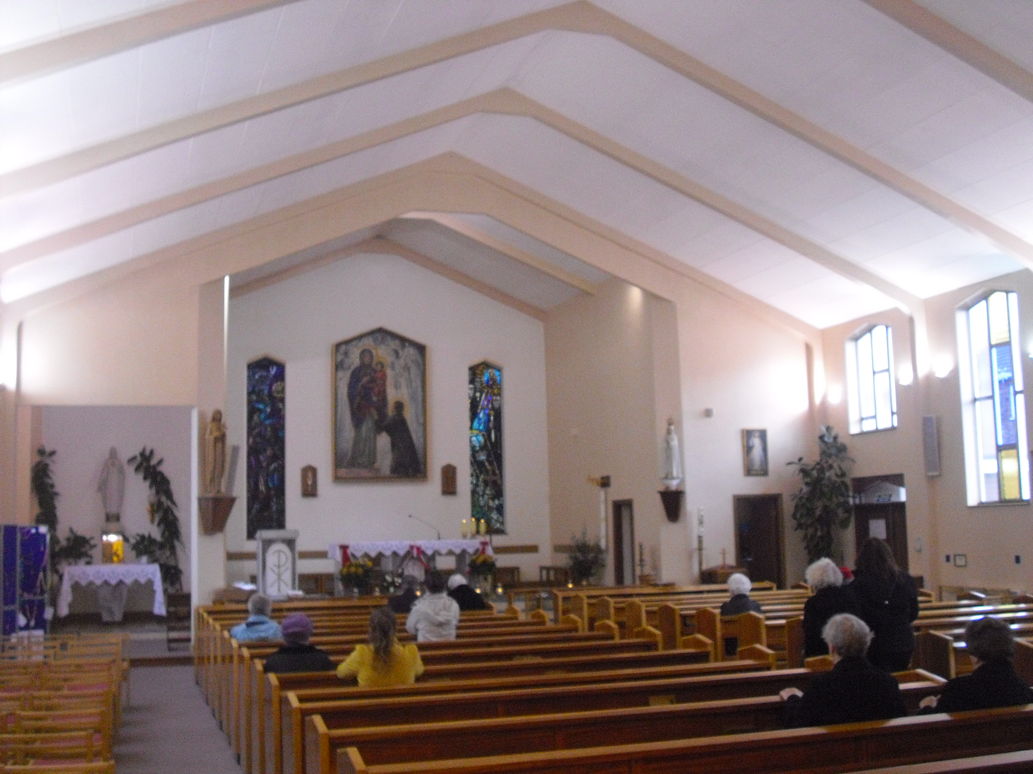 Kościół św. Stanisława Kostki w Coventry, wnętrze.